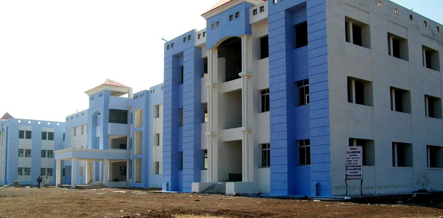 प्रतापगढ़ में नया कलेक्ट्रेट भवन.